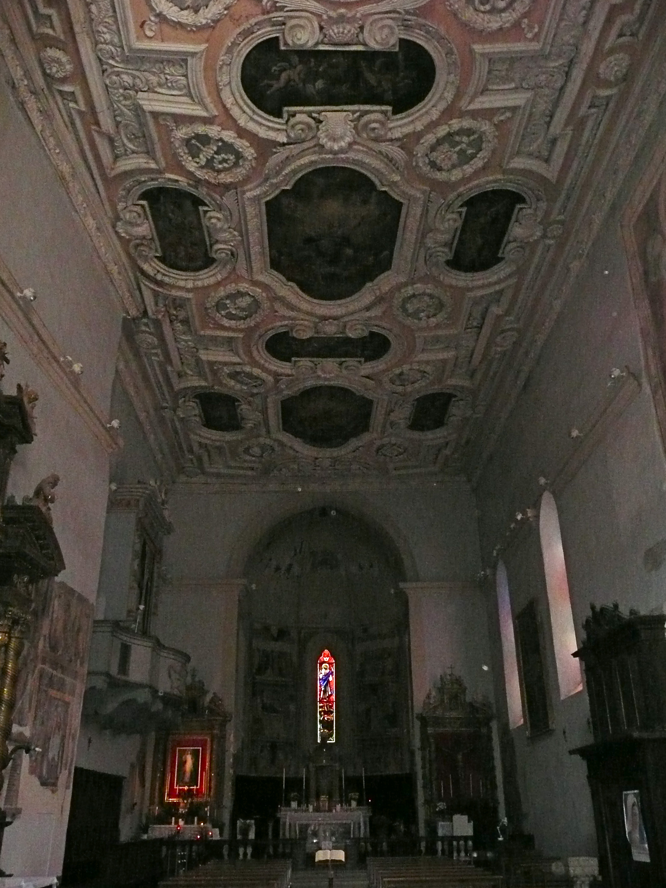 Visso, collegiata Santa Maria, inside